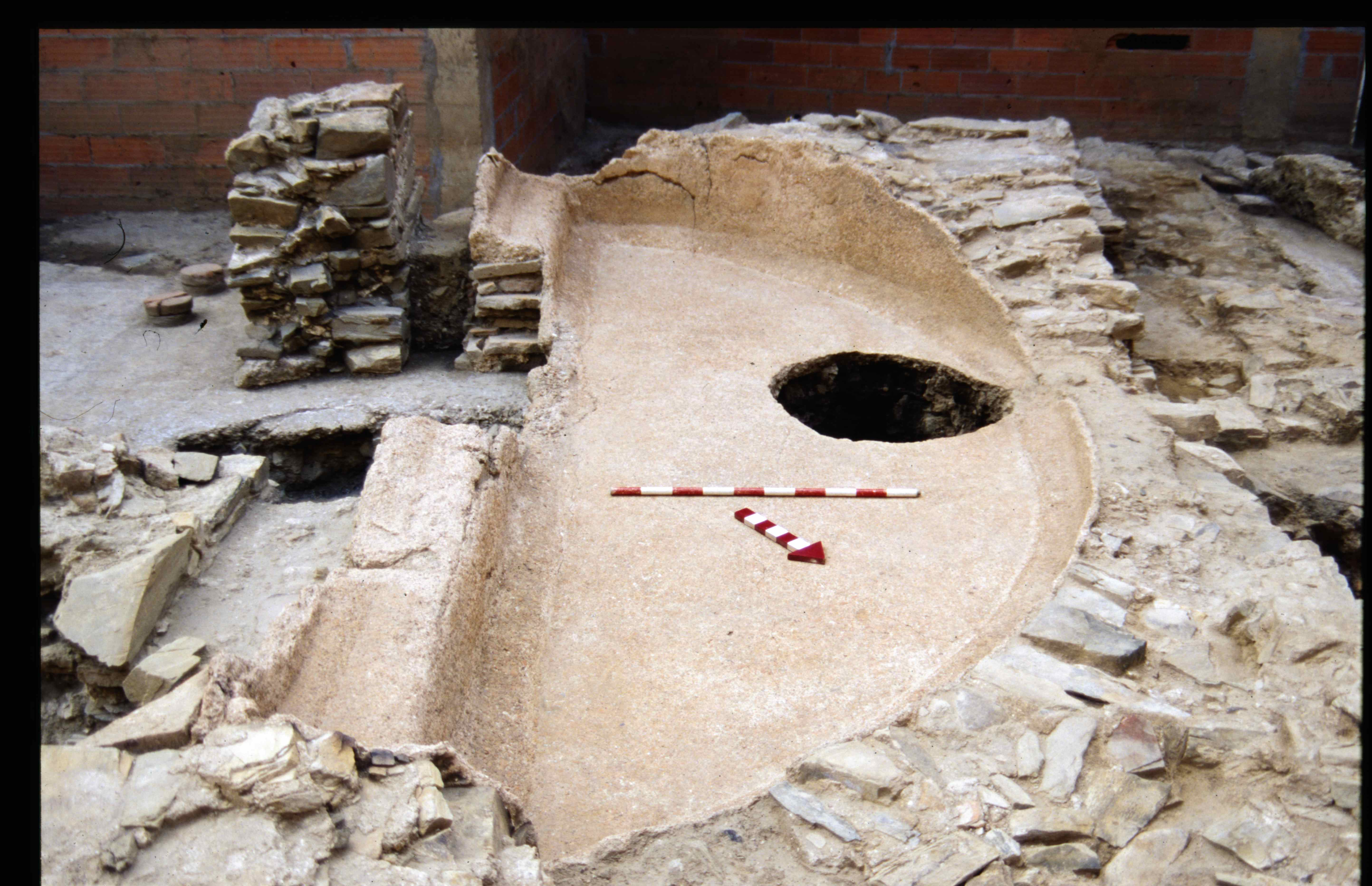 Bañera de las Termas Mayores. Excavación realizada en Astorga (León, España). Foto por M.A. Sevillano. Museo Romano de Astorga.